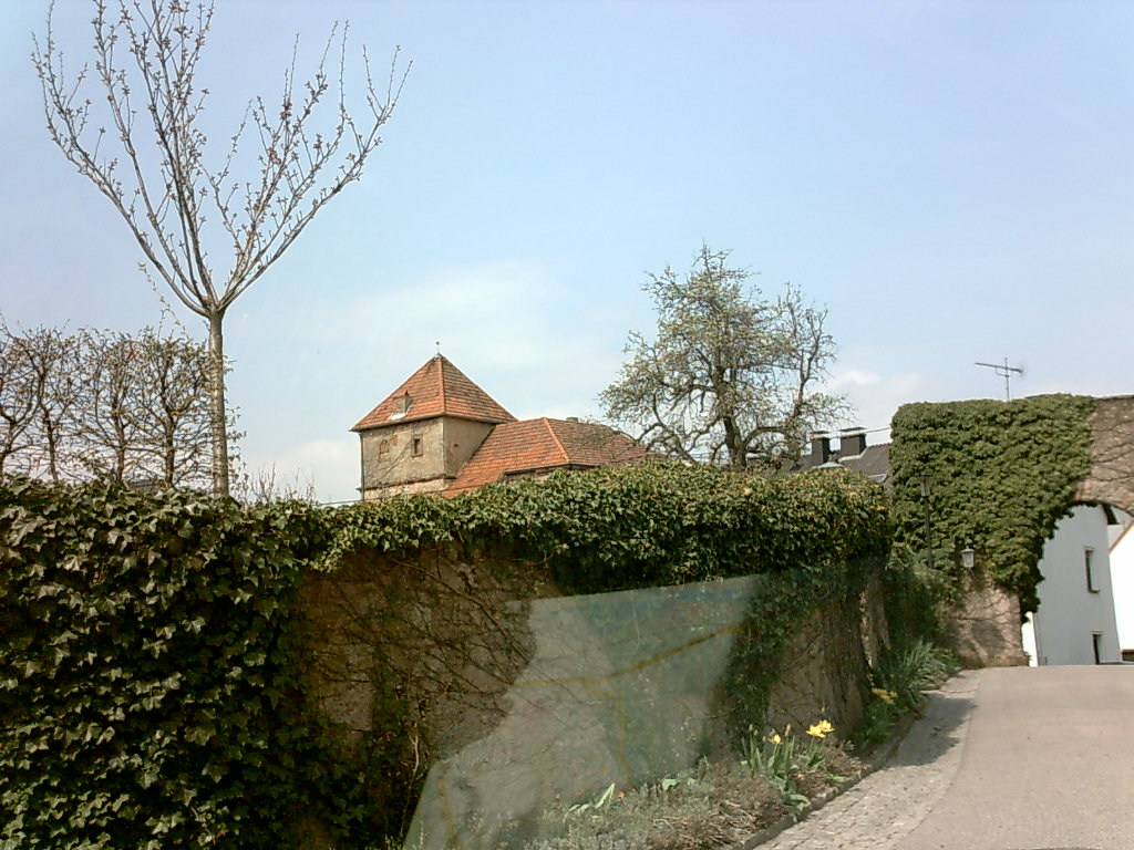 in Nennig